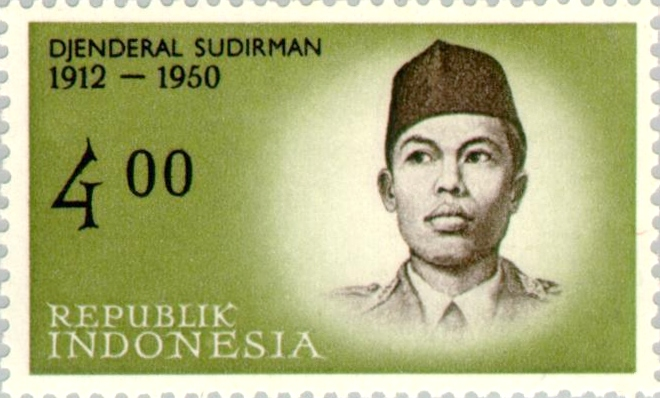 General Sudirman